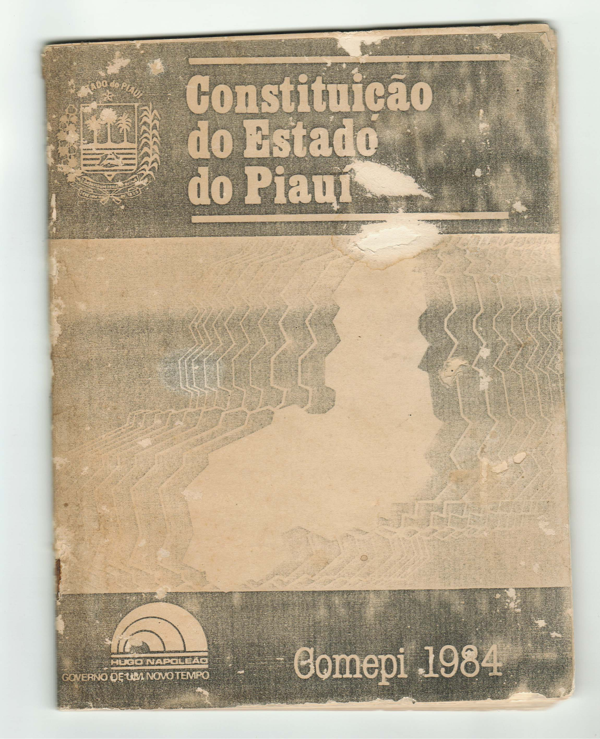 Capa da Constituição do Estado do Piauí de 1967, com o texto da emenda 1 de 1971.